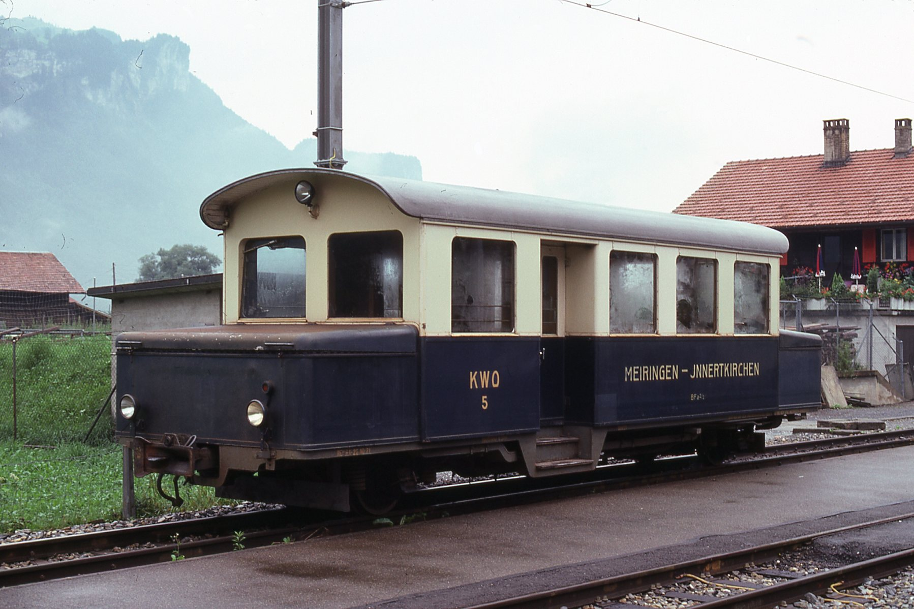 Le chemin de fer Meiringen-Innertkirchen (MIB) était jusqu'en 1976 non électrifié. Les deux motrices, la BDe 2/2 4 et la BDe 2/2 5, étaient à accumulateurs. La motrice no 5 a été préservée sous un hangard à Innertkirchen et la no 4 a été préservée au Musée suisse des transports à Luzern (VHS). Après 1976, la ligne a été électrifiée et c'est deux anciens trams allemand qui ont circulés sur cette ligne.